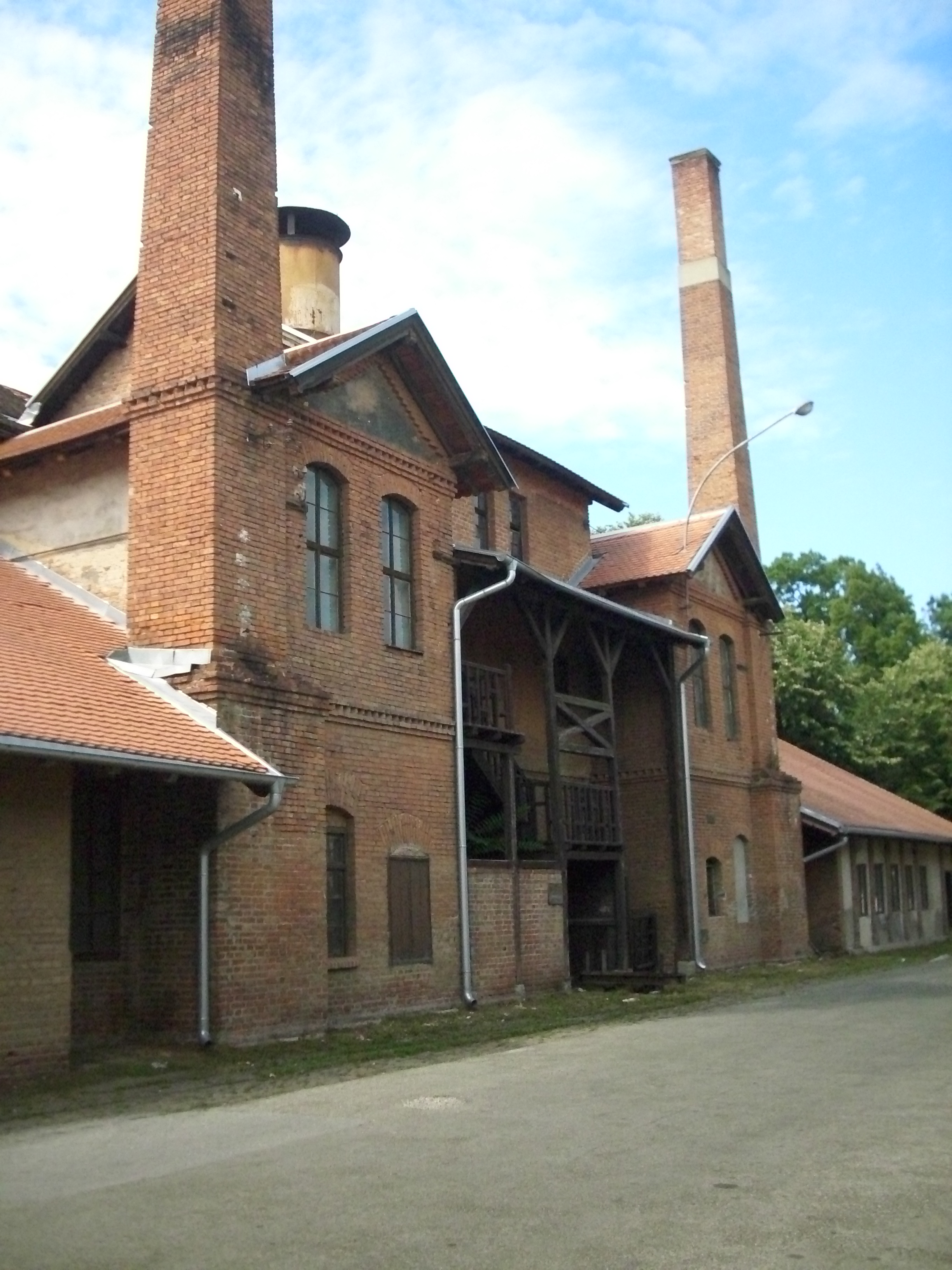 Зграда ливнице са ковачницом у Крагујевцу